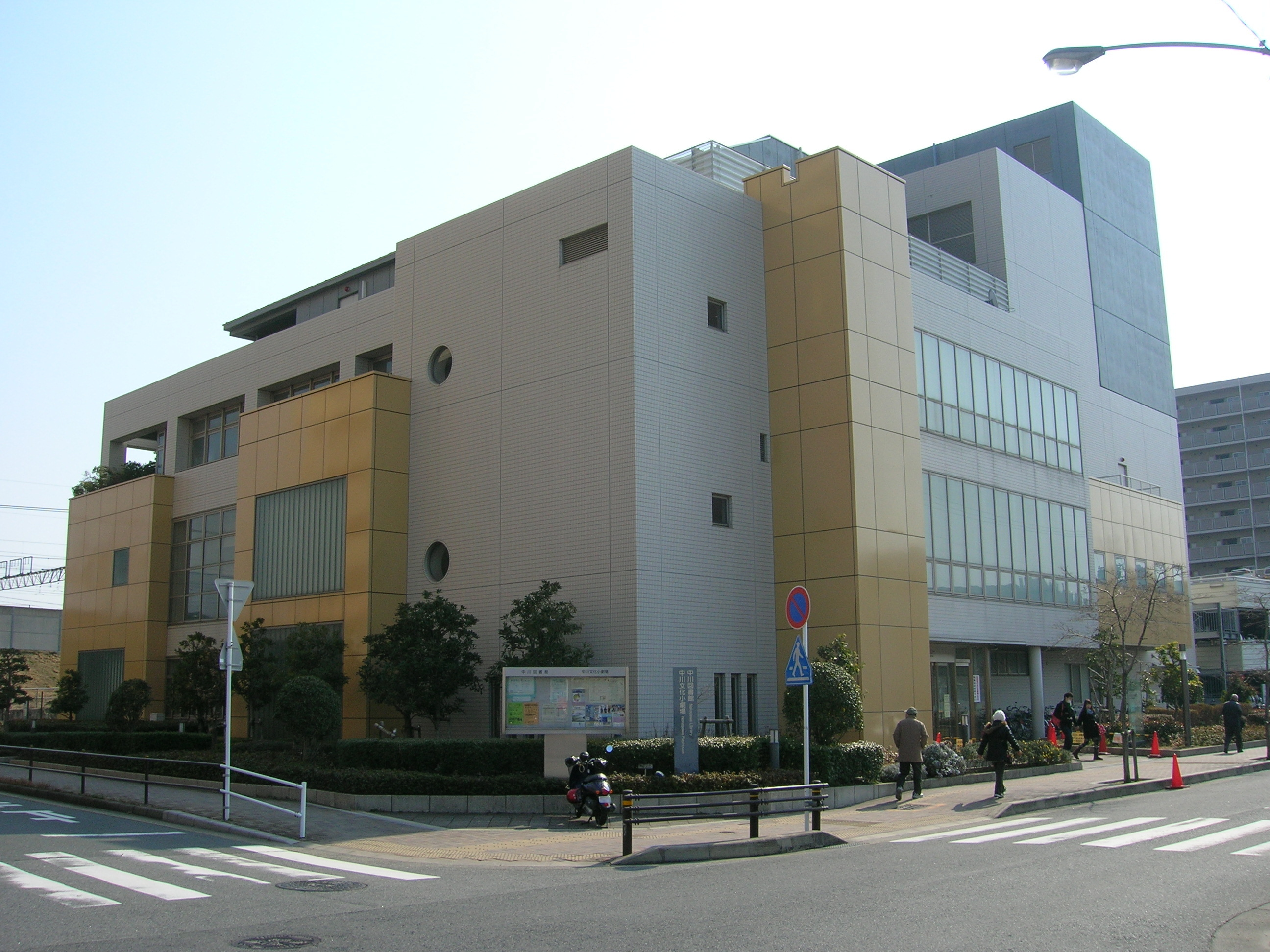 Nagoya city Nakagawa library, and Nagoya city Nakagawa playhouse. Loc: Nakagawa-ku, Nagoya city, Aichi Prefecture, Japan. 名古屋市中川図書館・中川文化小劇場 撮影場所 愛知県名古屋市中川区